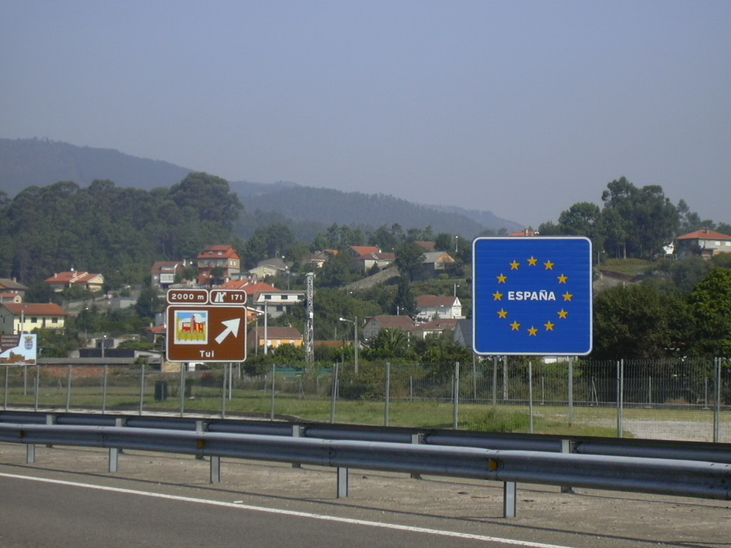 Fronteira entre Espanha e Portugal (Tui e Valença do Minho)